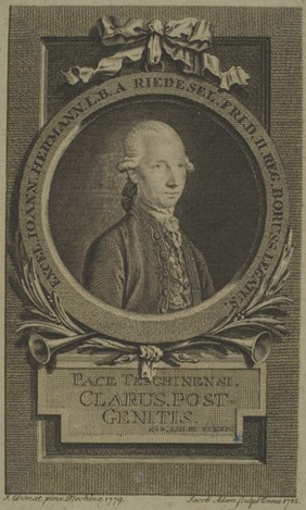 Portrait du diplomate, voyageur et écrivain allemand Johann Hermann von Riedesel (1740-1784). Portrait réalisé au plus tard en 1784, mais probablement entre 1779 et 1782 (voir légende manuscrite sous le cadre).